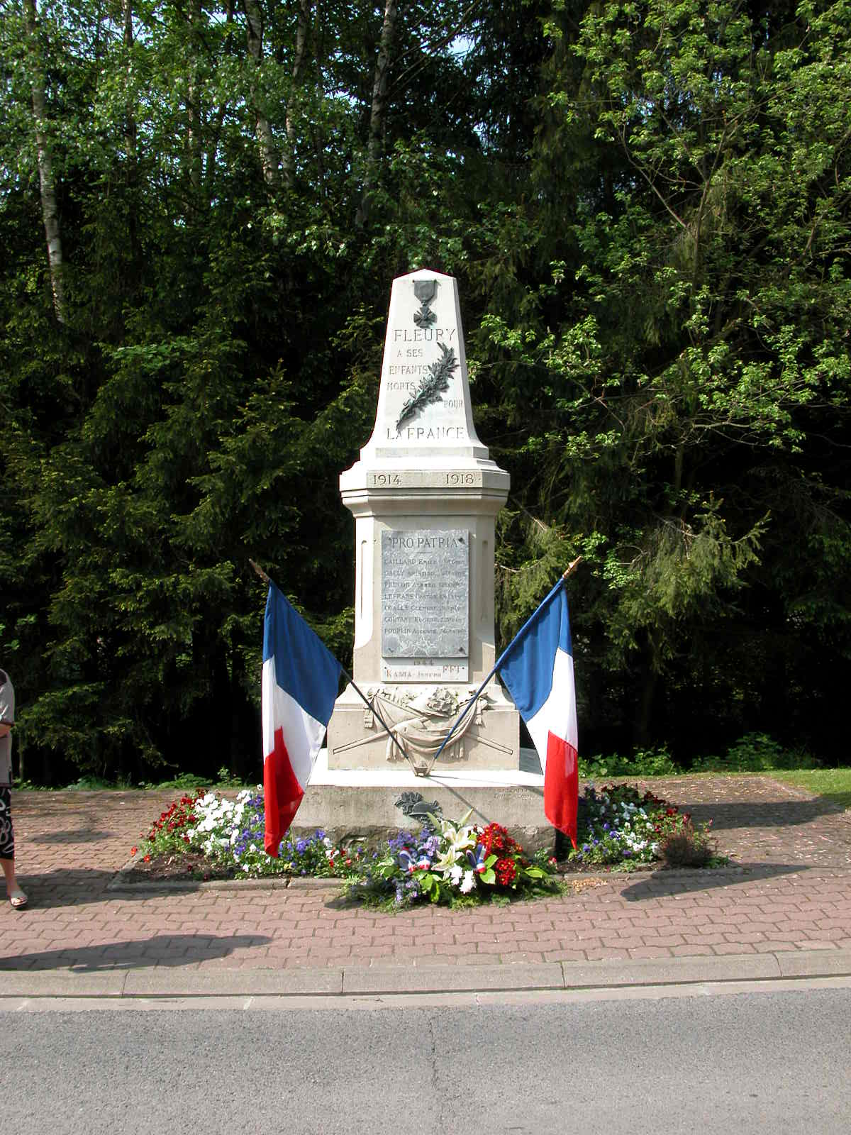 Le monument.